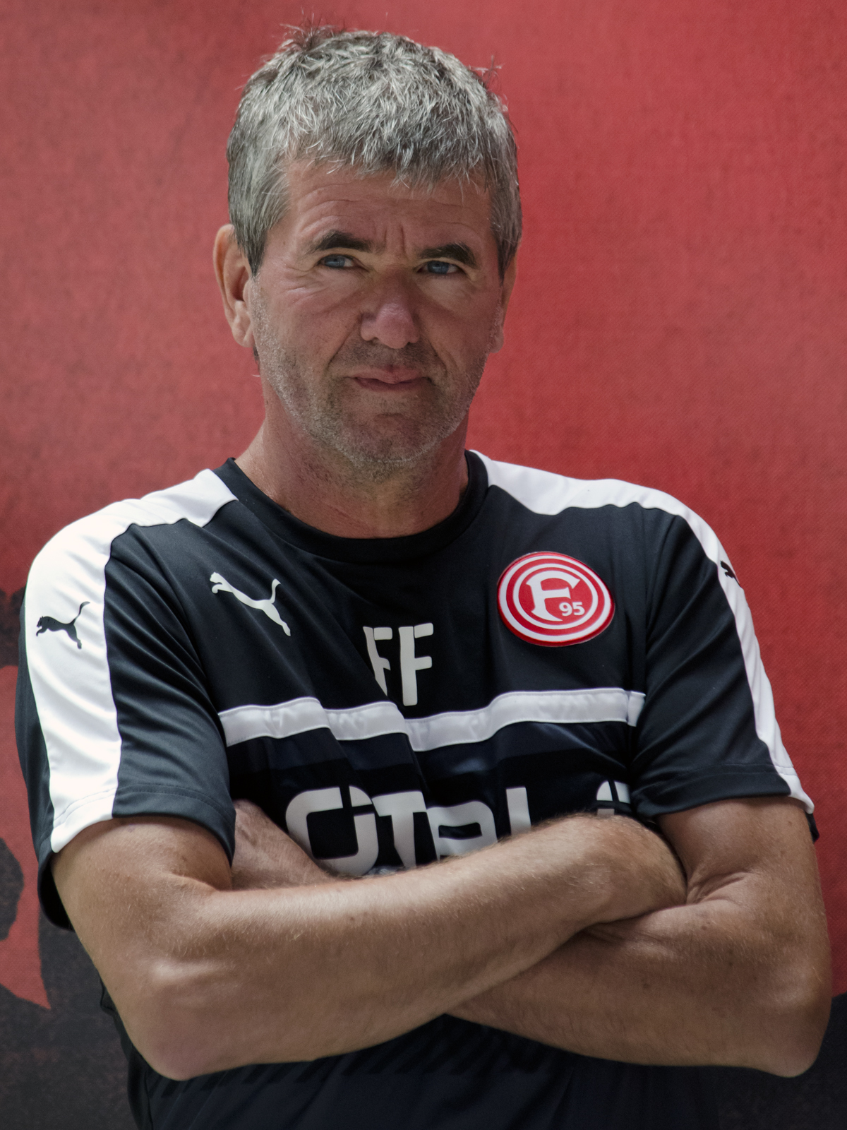 Friedhelm Funkel, deutscher Fußballspieler und heutiger -trainer (2016)